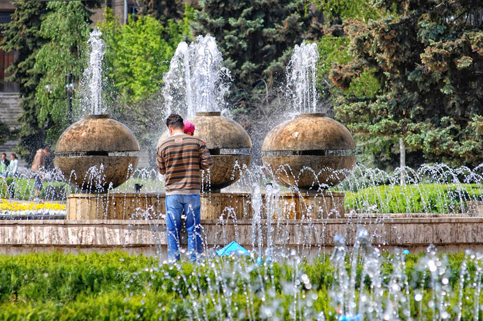 Fantana arteziana de la ceas